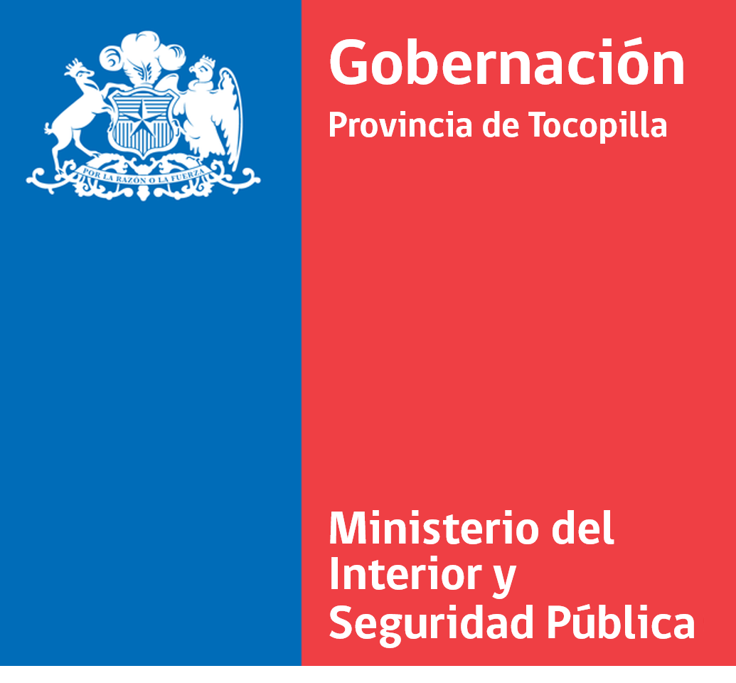 Logotipo de la gobernación provincial, usado desde 2010, durante la administración de Sebastián Piñera.